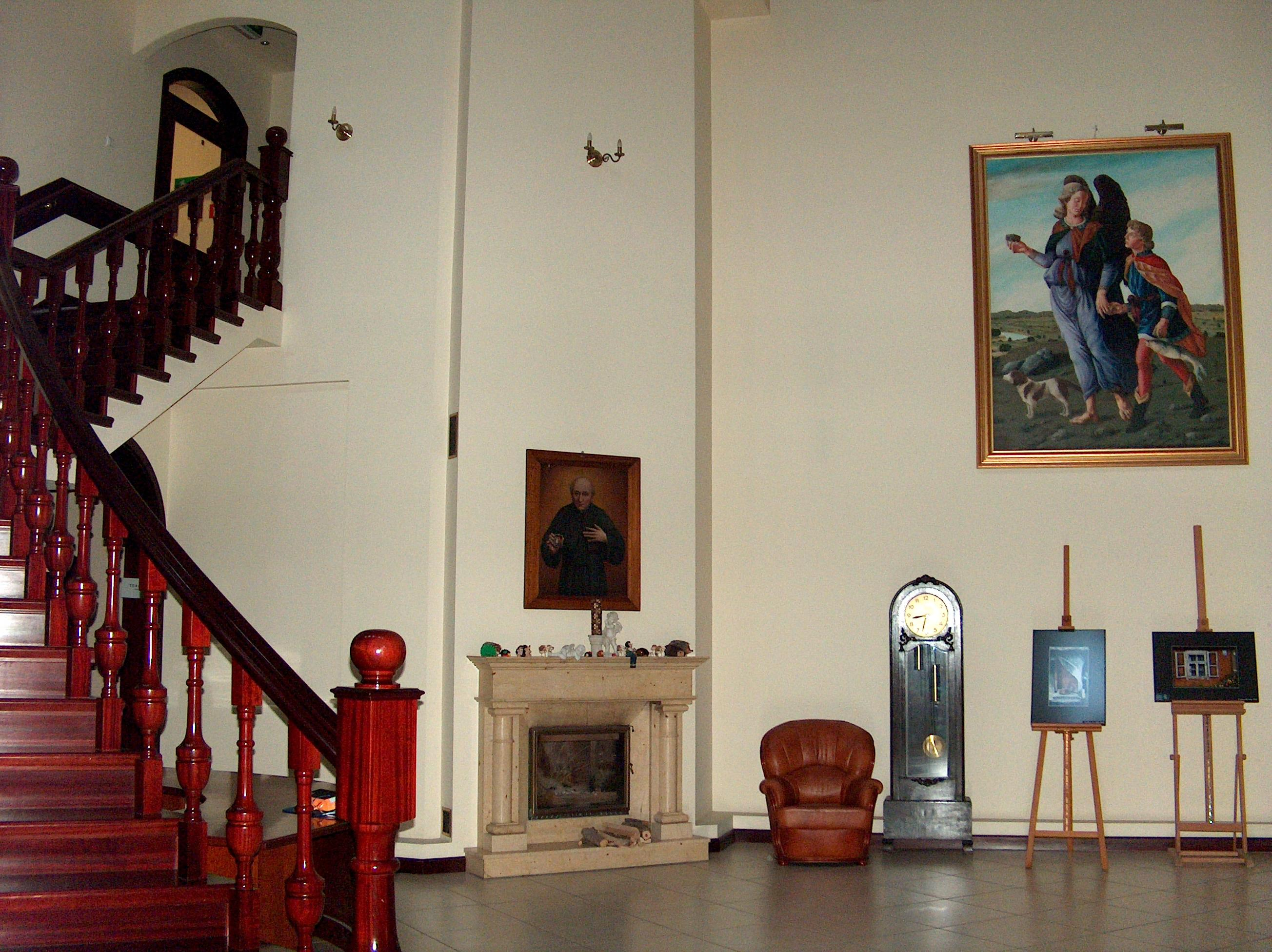 Hol Hospicjum Pallottinum w Gdańsku.